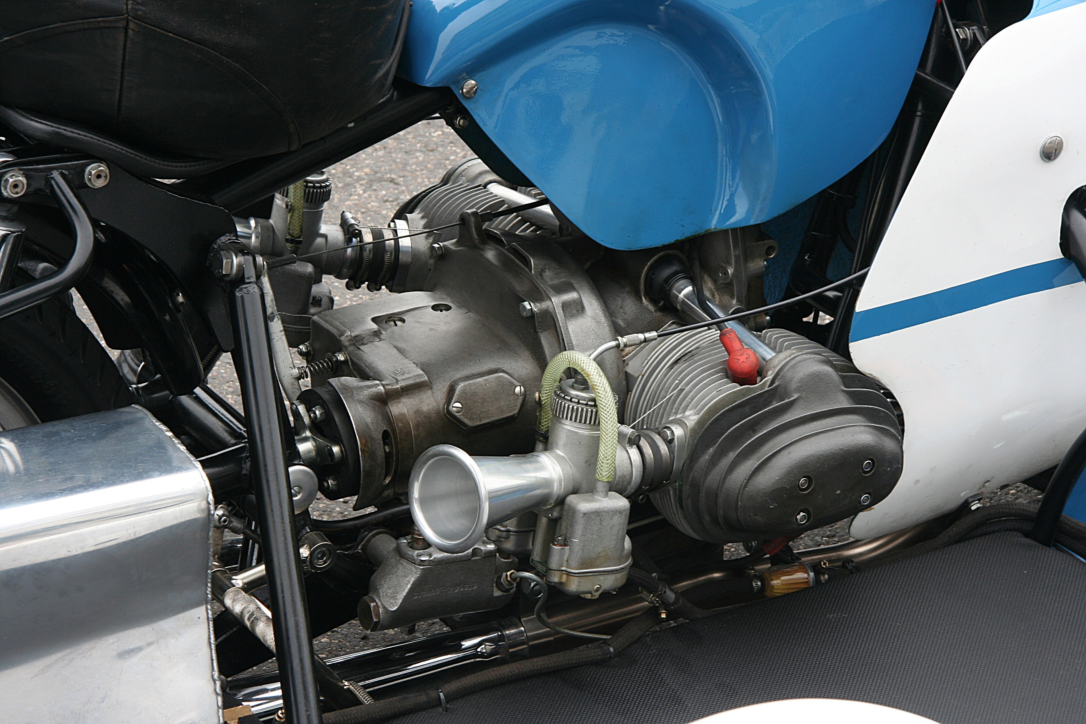 Motor der BMW RS 54 in einem Replikat des Gespanns von Deubel/Hörner